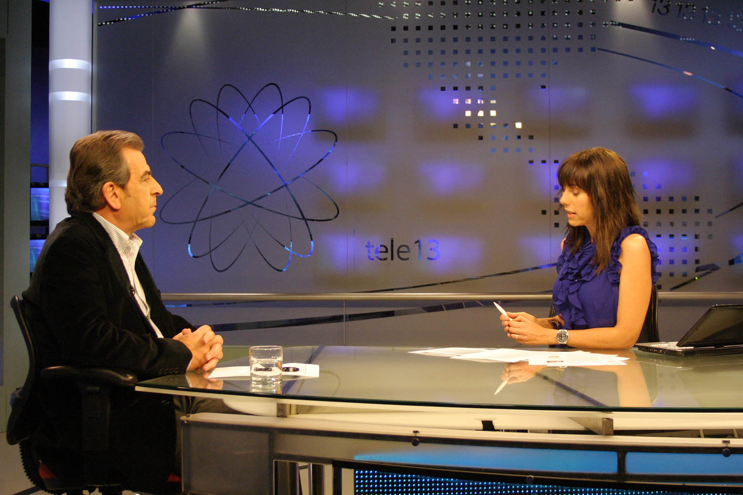 Eduardo Frei Ruiz-Tagle en una entrevista en Telenoche, programa de Canal 13